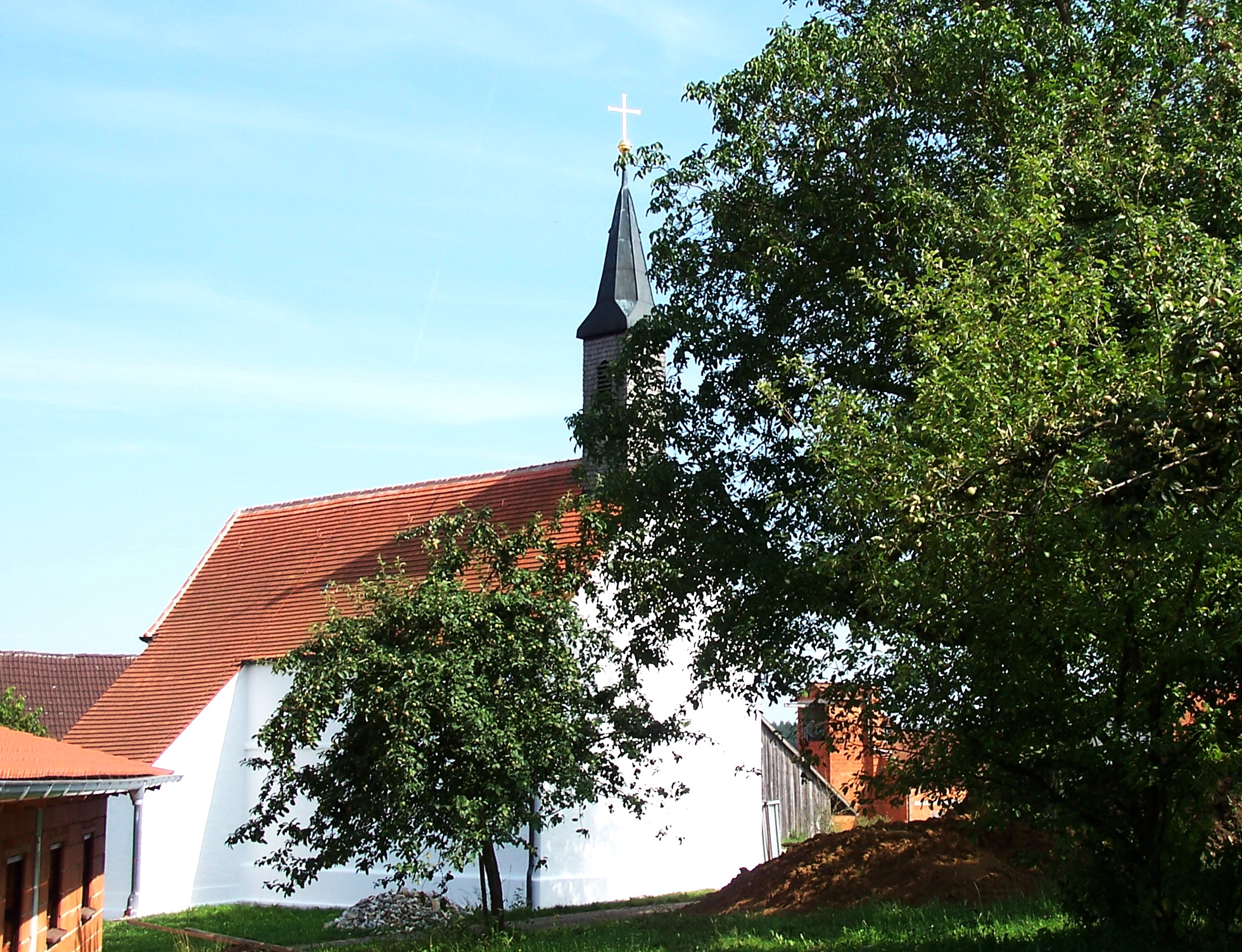 Ebenhausen 7. Filialkirche St. Ulrich. Spätgotischer Bau des 15. Jh.; mit Ausstattung.